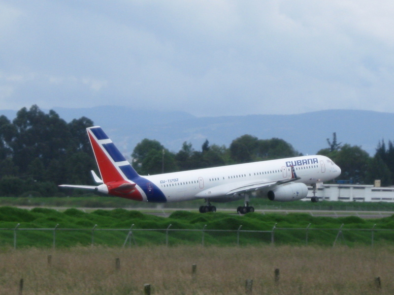 Tupolev Tu204 de Cubana de Aviación aterrizando en el Aeropuerto Internacional El Dorado de Bogotá, Colombia procedente de La Habana.